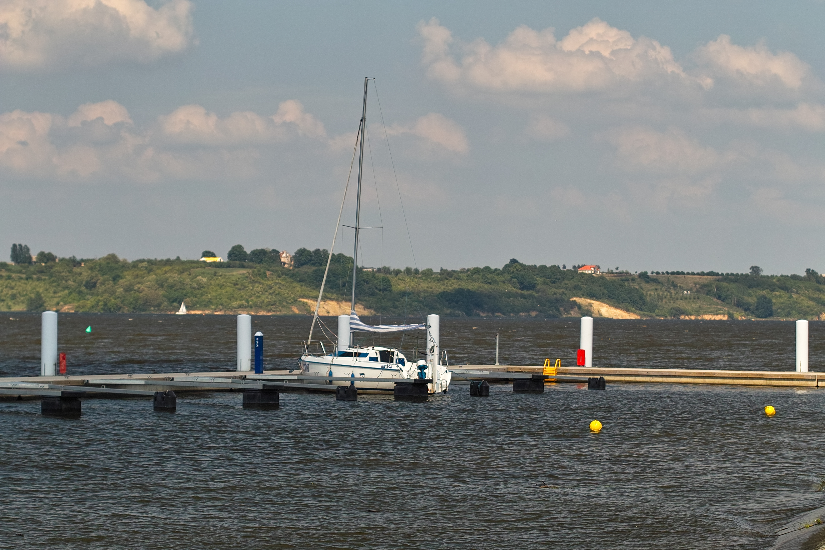 Przystań wodna na Jeziorze włocławskim